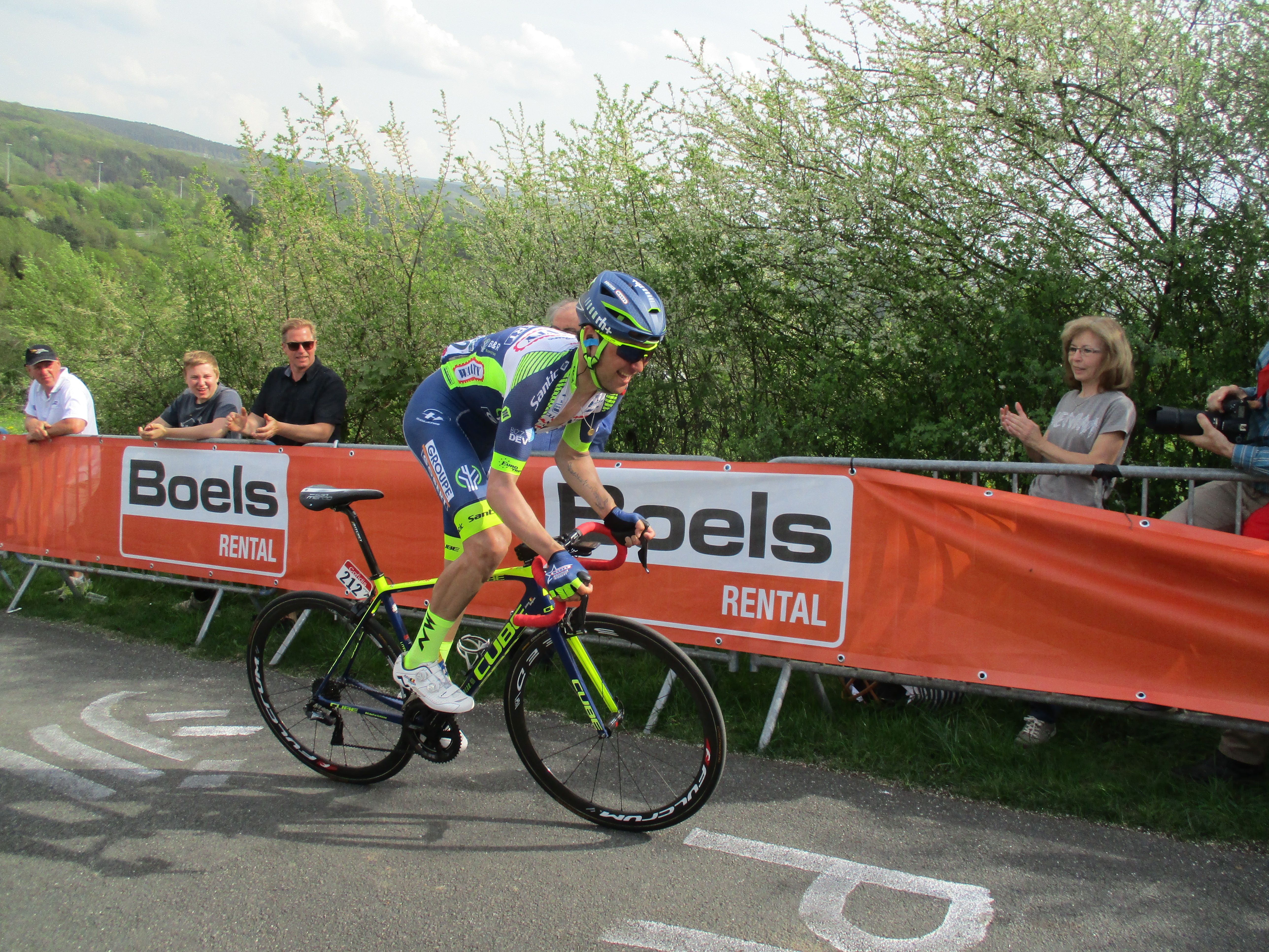 Beklimming van La Redoute tijdens Luik-Bastenaken-Luik 2018.